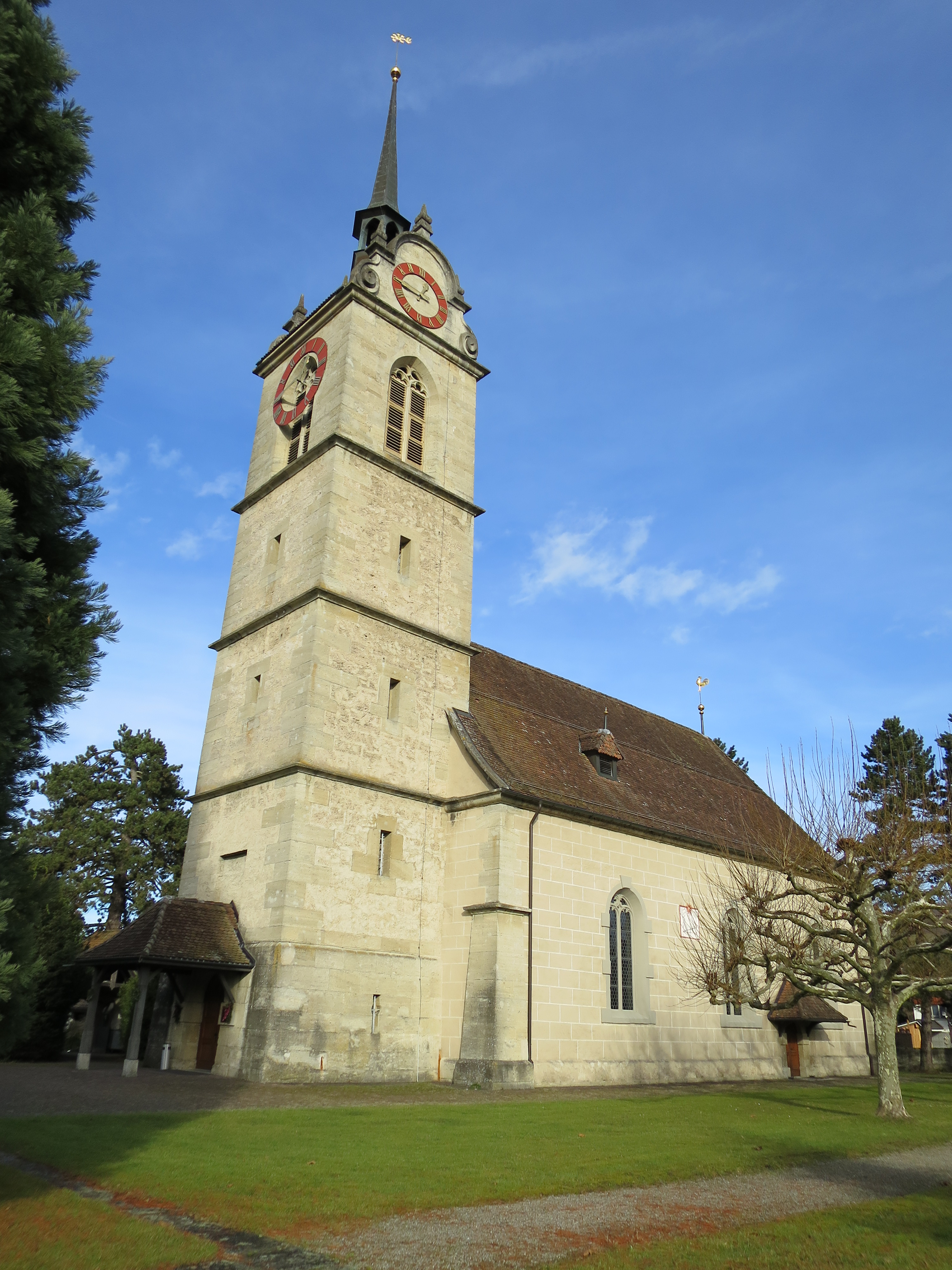 Aussenansicht der reformierten Kirche Gränichen